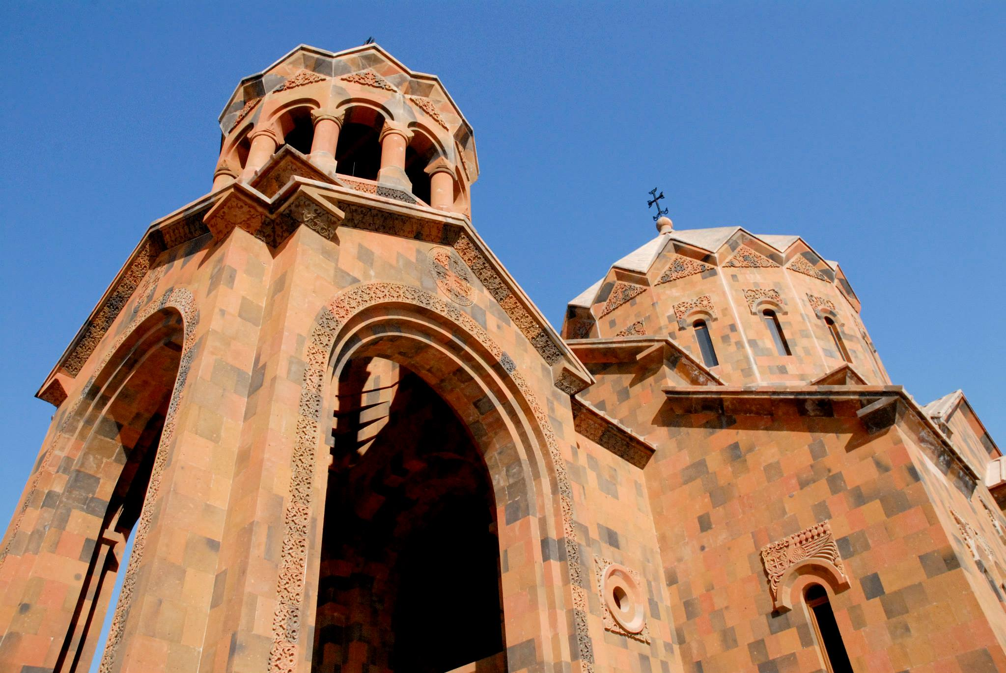 Արտաշատ քաղաքի Սուրբ Հովհաննես Ավետարանիչ եկեղեցին